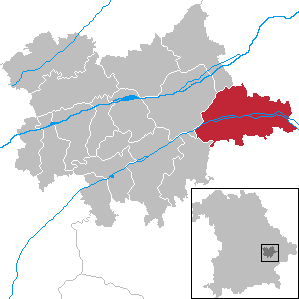 Eichendorf in Bavaria - District Dingolfing-Landau